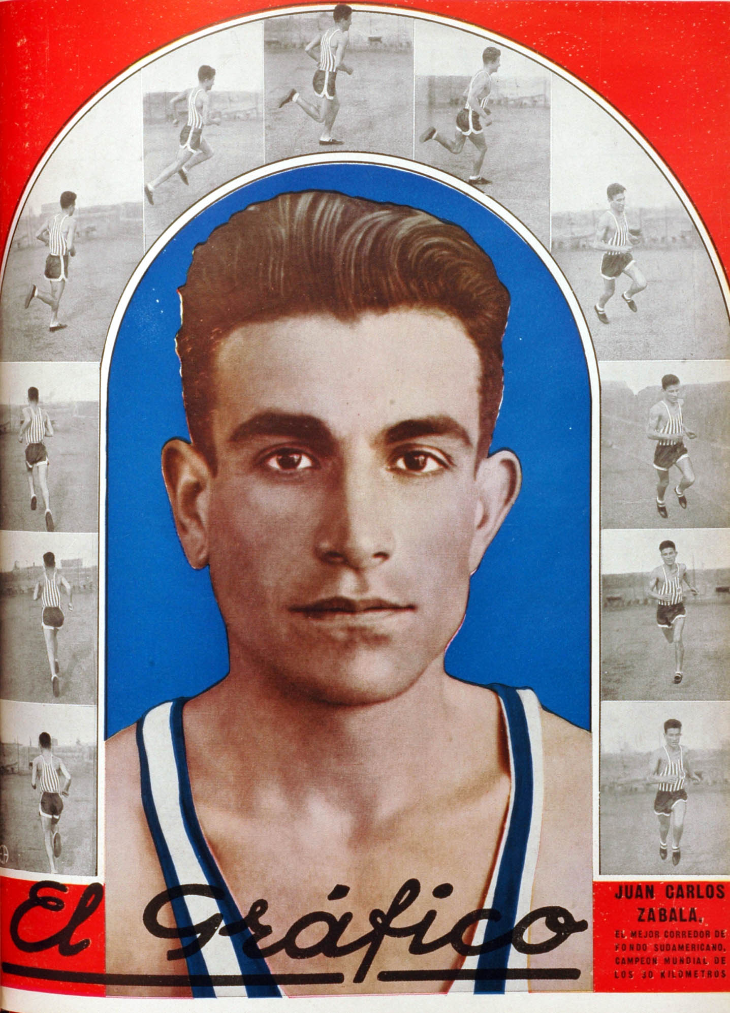 El Grafico del 02 de Abril de 1932. Edicion 664